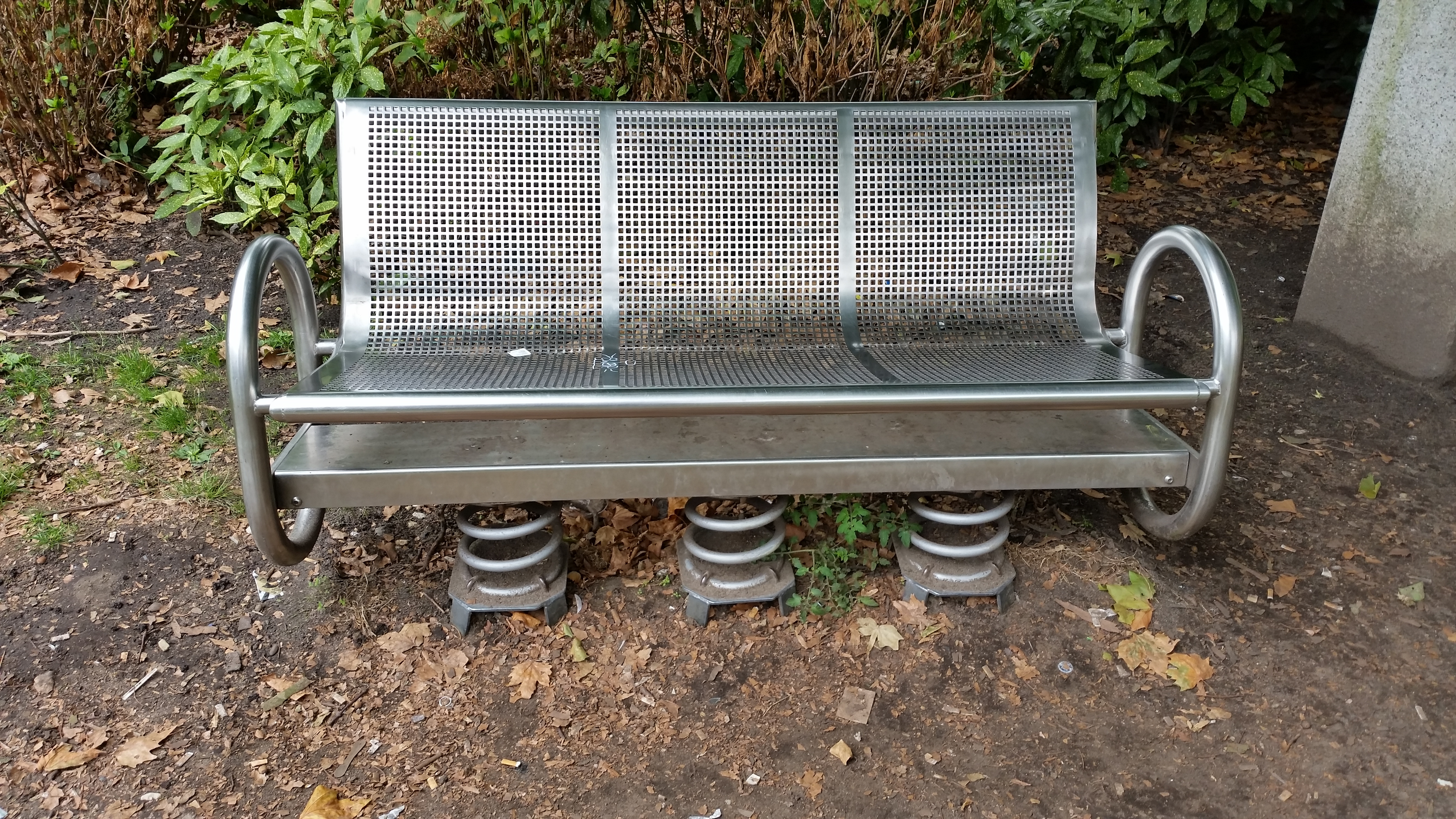 Zitbank op veren, naast het beeld van Simon Carmiggelt in het Eerste Weteringplantsoen, Amsterdam-Centrum